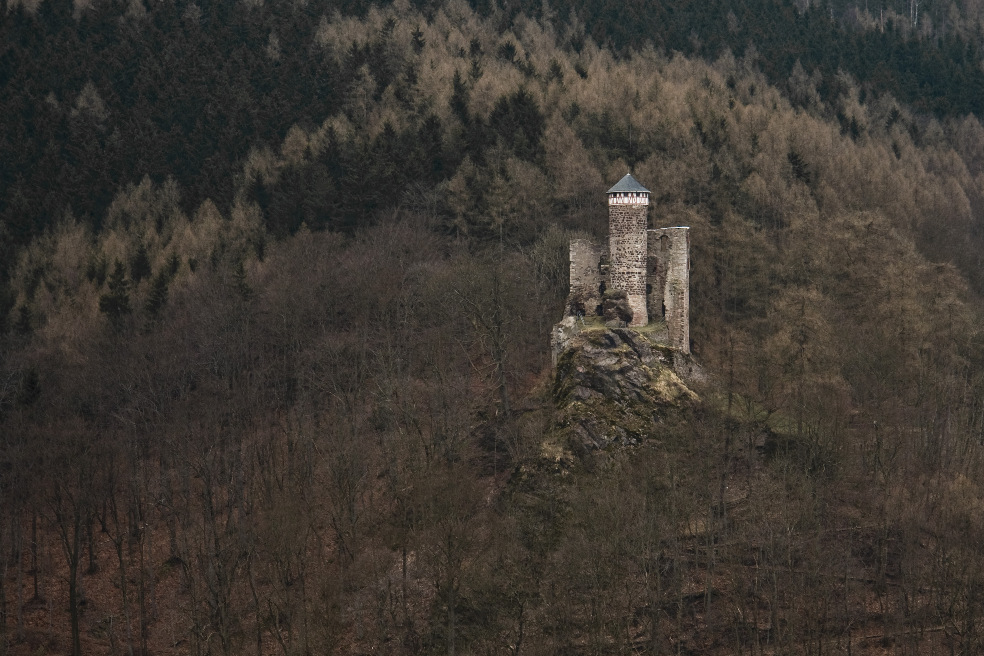 Hallenburg bei Steinbach-Hallenberg vom Arzberg